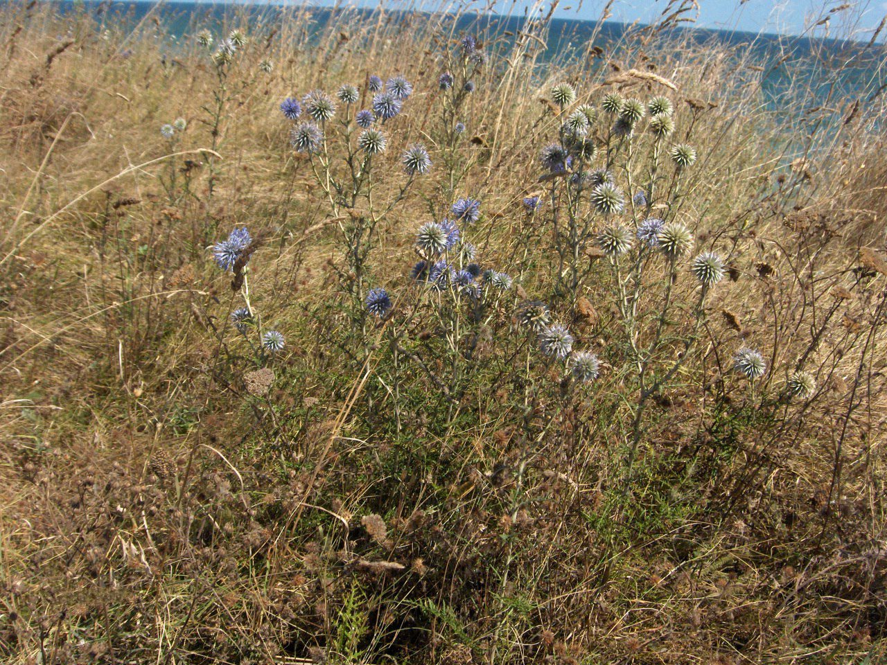 Kék szamárkenyér (Echinops ruthenicus) löszfalnövényzetben a román Costinesti mellett. Magyarországon védett.